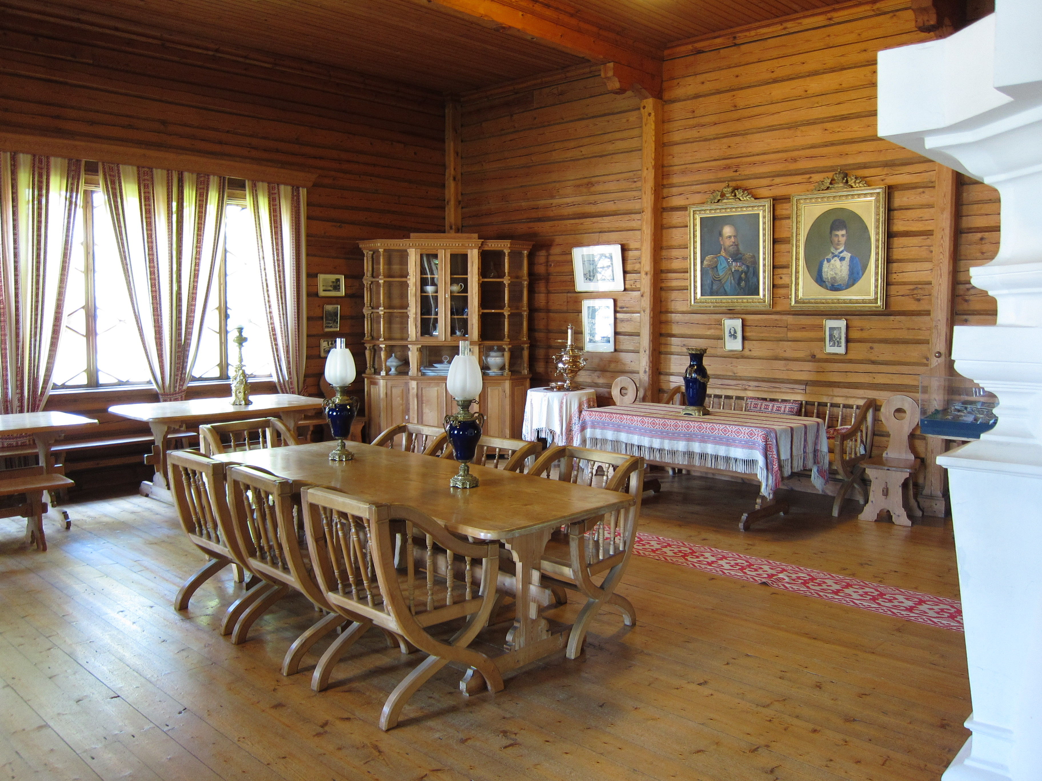 Sisänäkymä Langinkosken keisarillisesta kalastusmajasta Kotkassa.